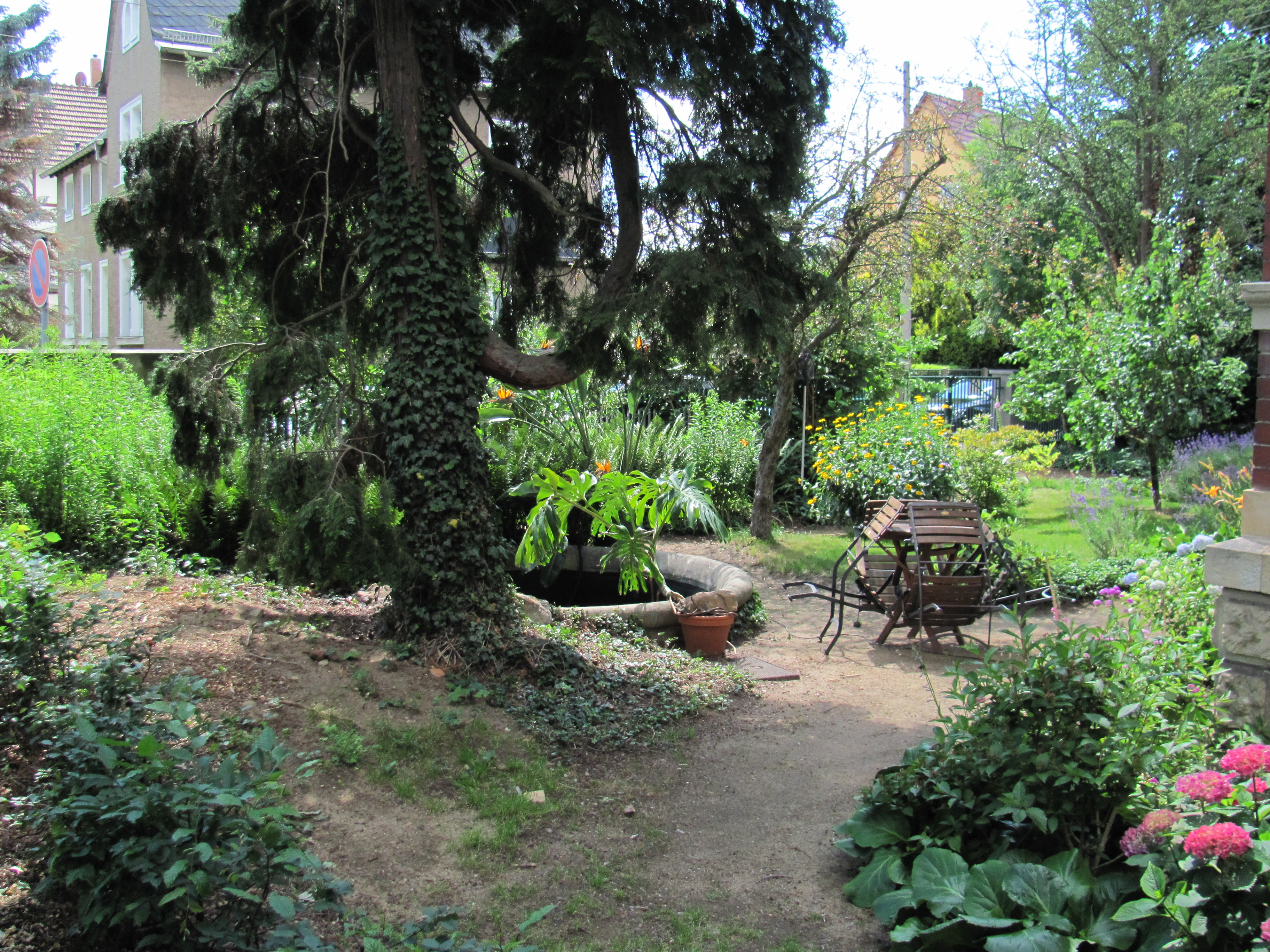 Fehlende Kulturdenkmale nach Wikipedialiste in Heinrich-Heine-Straße, Horst-Vieth-Straße, Humboldtstraße, Dr-Rudolf-Friedrichstraße